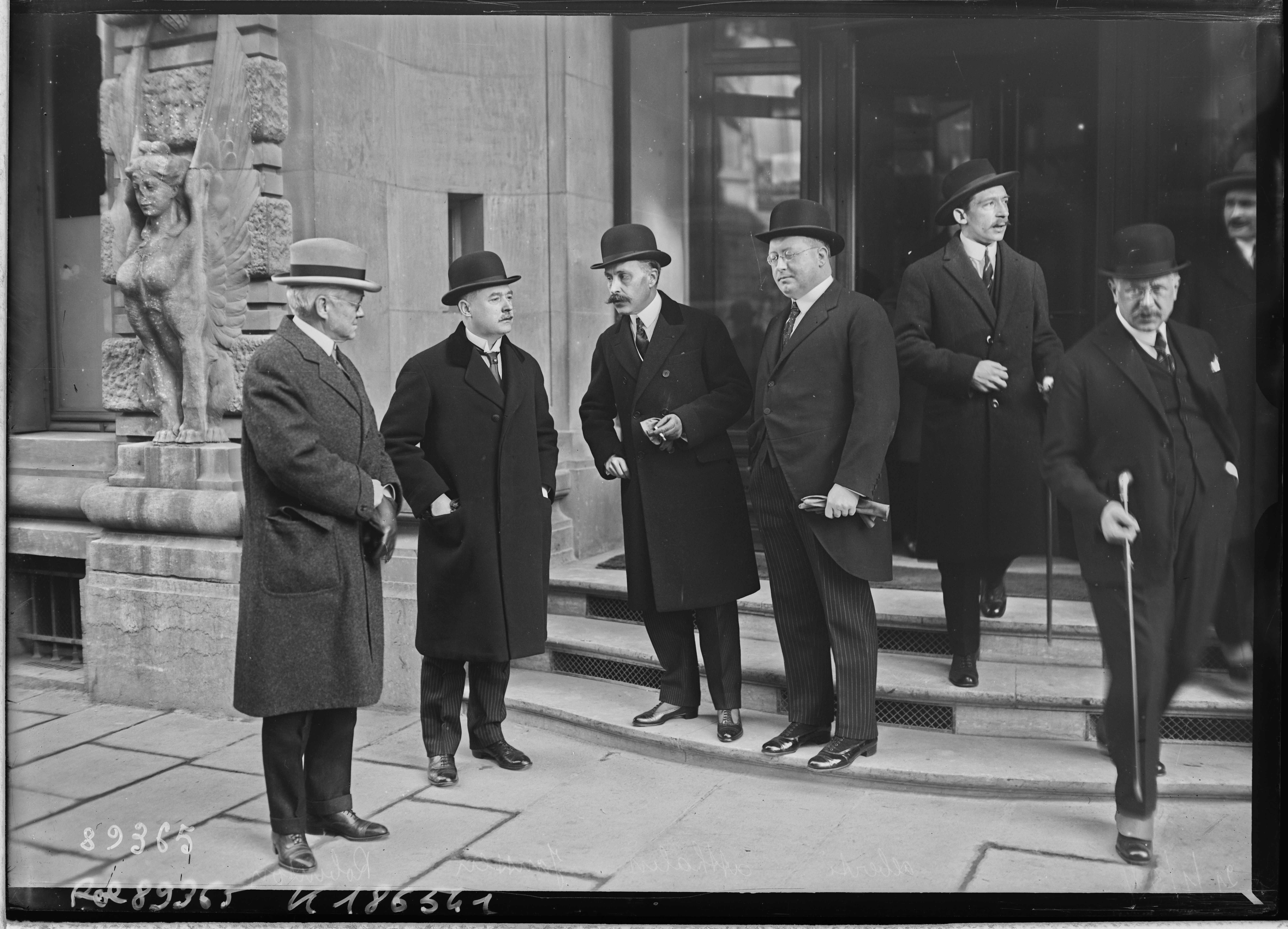 21/1/24 [de g. à d.] Henry M. Robinson [délégué américain], Albert Edouard Janssen [délégué belge], André Laurent-Atthalin [délégué français], Mario Alberti [délégué italien], faisant partie du comité d'experts (Comité McKenna) réunis à l'hôtel Astoria de Paris] : [photographie de presse] / [Agence Rol]